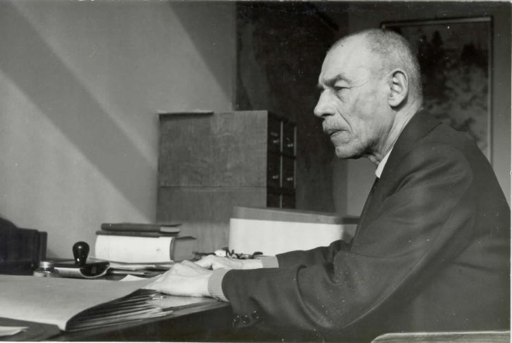 Srečko Brodar